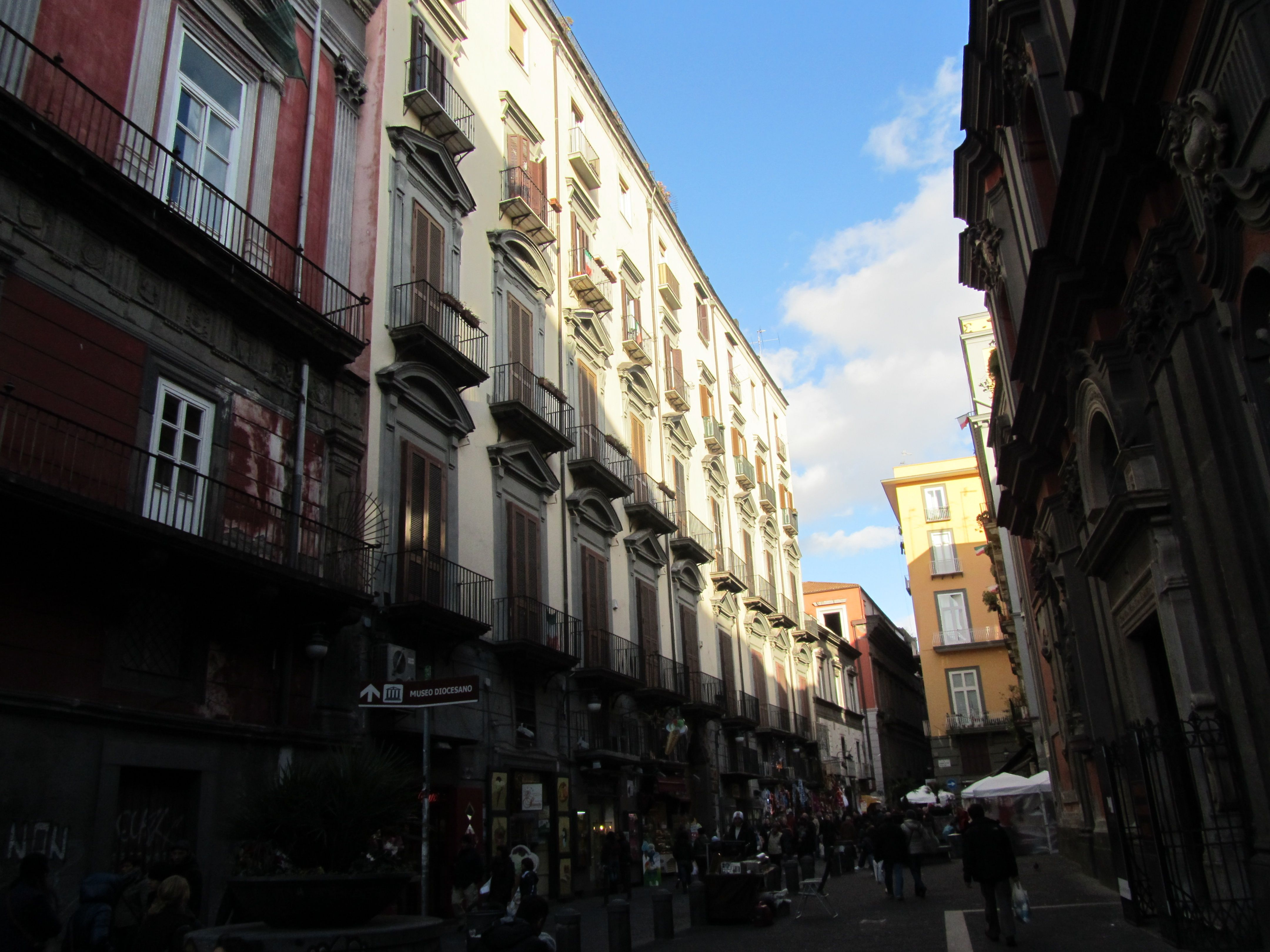 Palazzo De Sangro di vietri (Napoli)